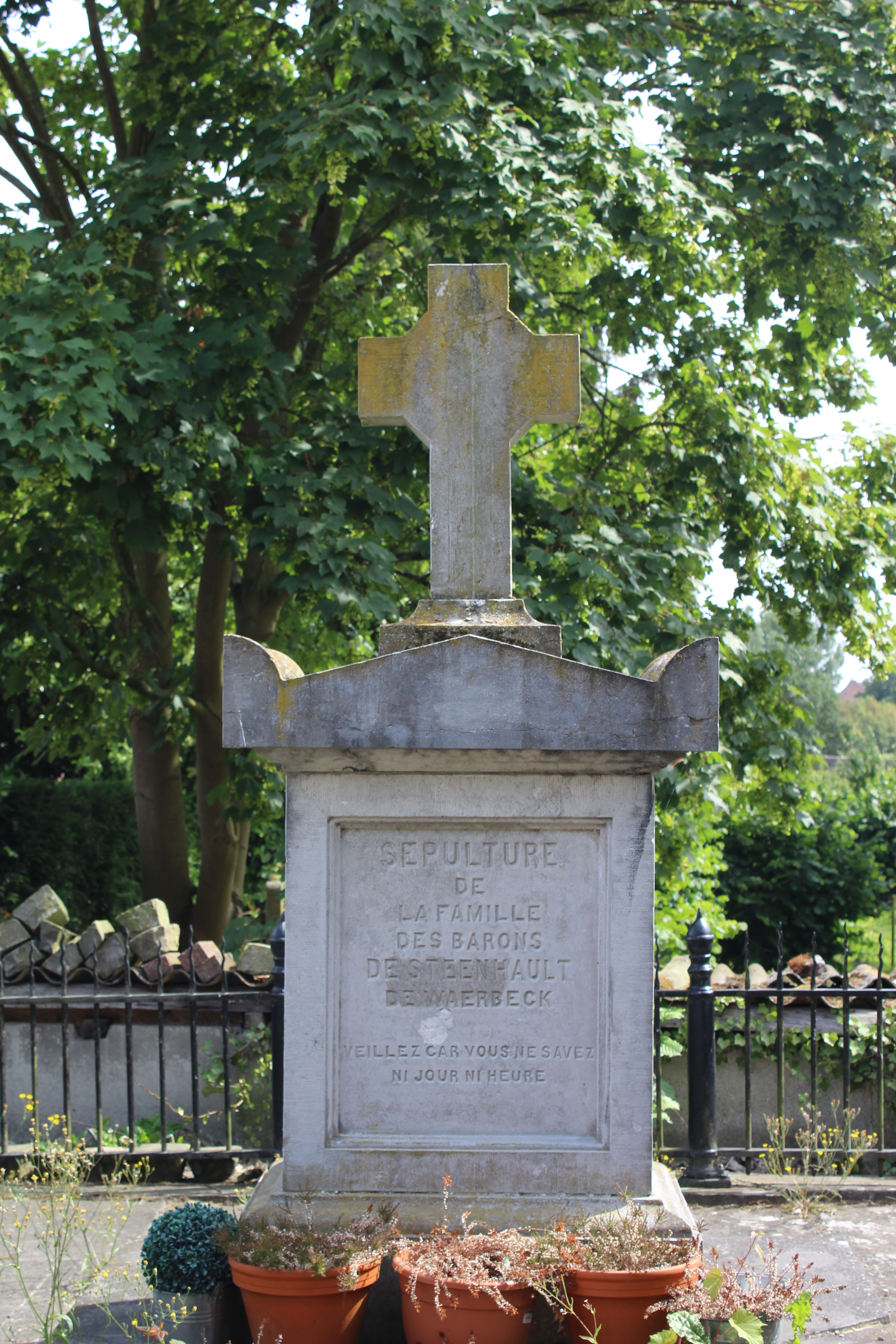 Mausoleum van de familie de Steenhault de Waerbeck, kasteelheren van Steenhault, op het gesloten kerkhof van Vollezele